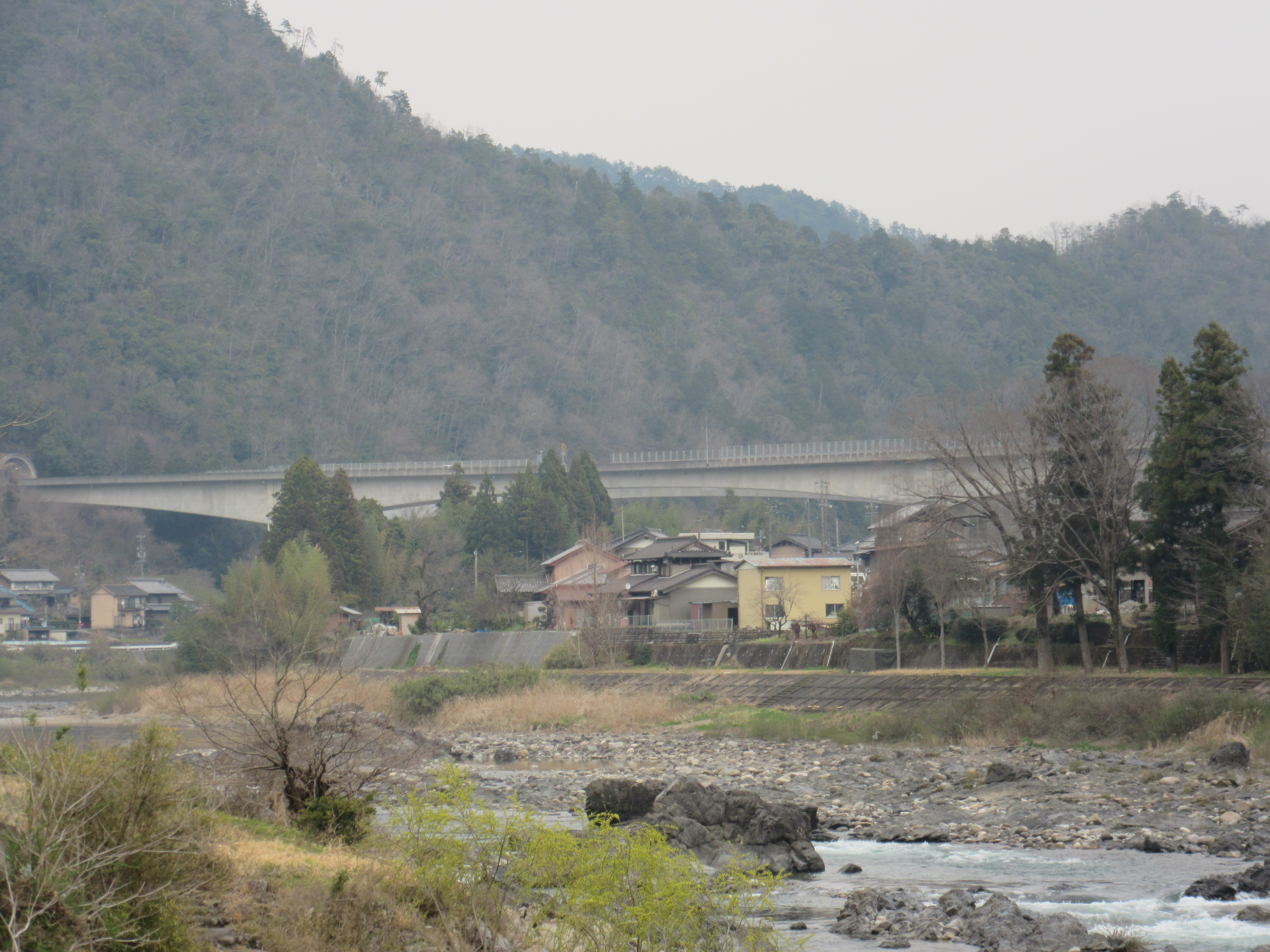 東海北陸自動車道立花橋